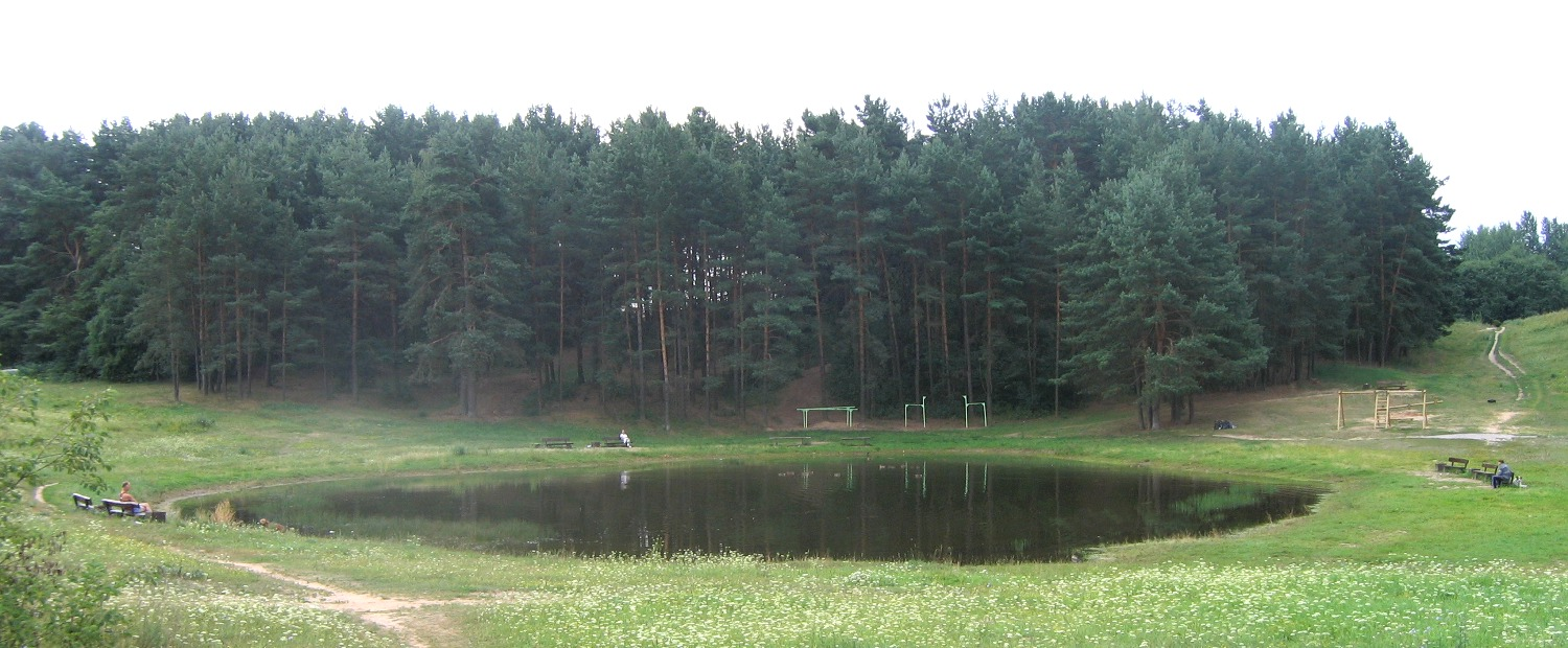 Autoriaus nuotrauka. 2006.07.29. Ežeriukas Ozo teritorijoje